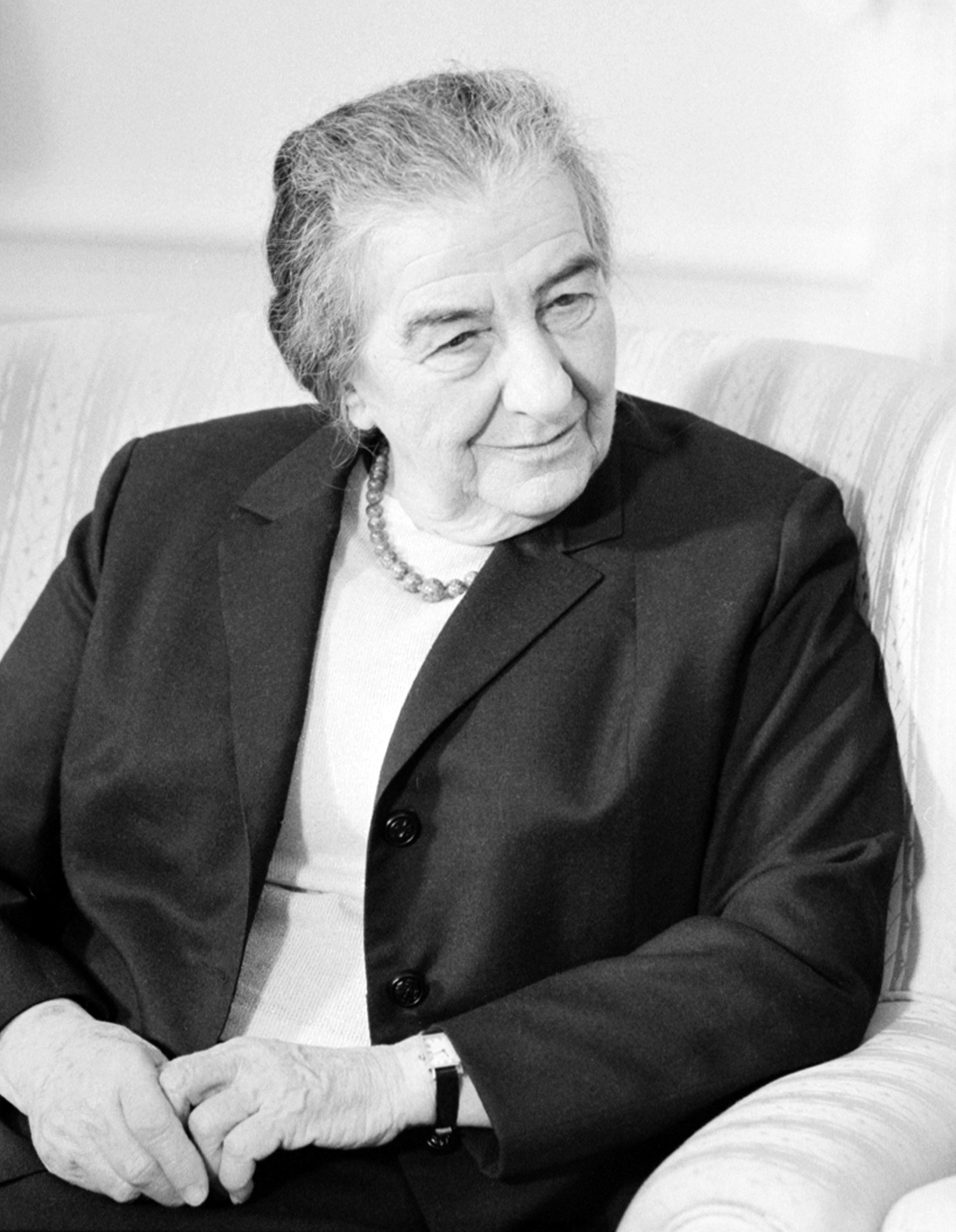 Golda Meir, Israeli PM.